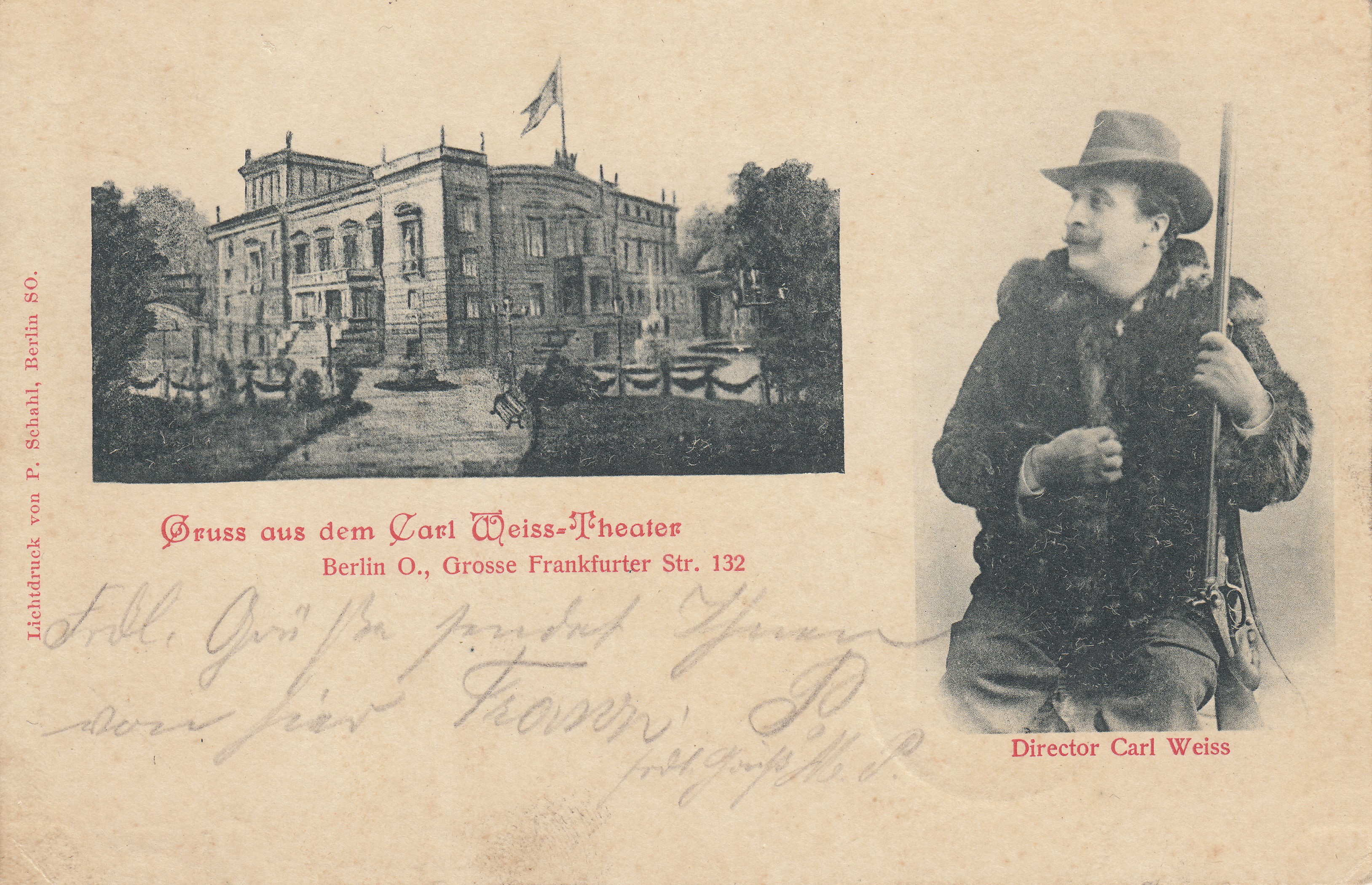 Carl-Weiss-Theater Berlin (vorher "Ostend-Theater", später "Rose-Theater") und Direktor Carl Weiss